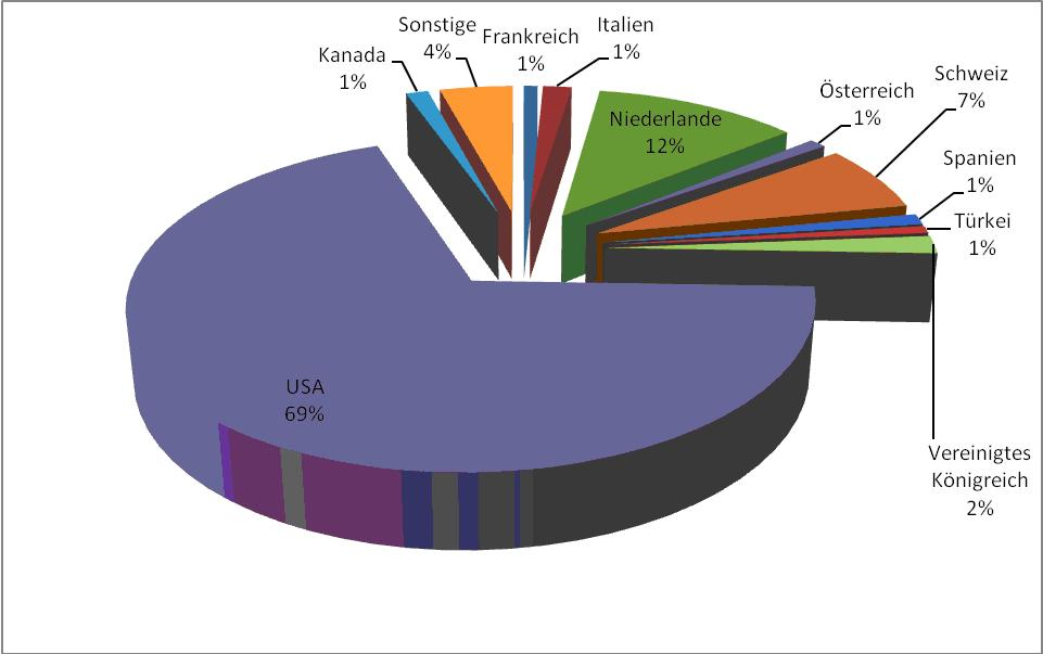 Gesamtübersicht aller ausgehenden Gesuche